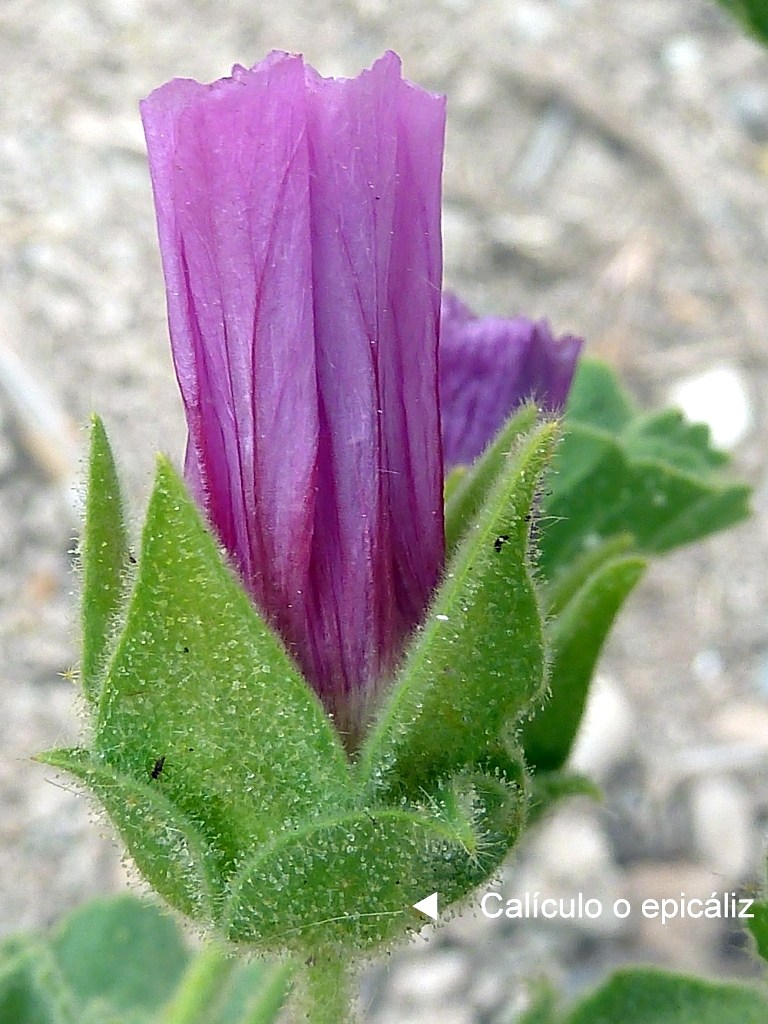 Lavatera triloba triloba (Malvavisco loco): Detalle del cáliz y del calículo - Camino de la Azarbe de Patricio, Albatera (Alicante, España).